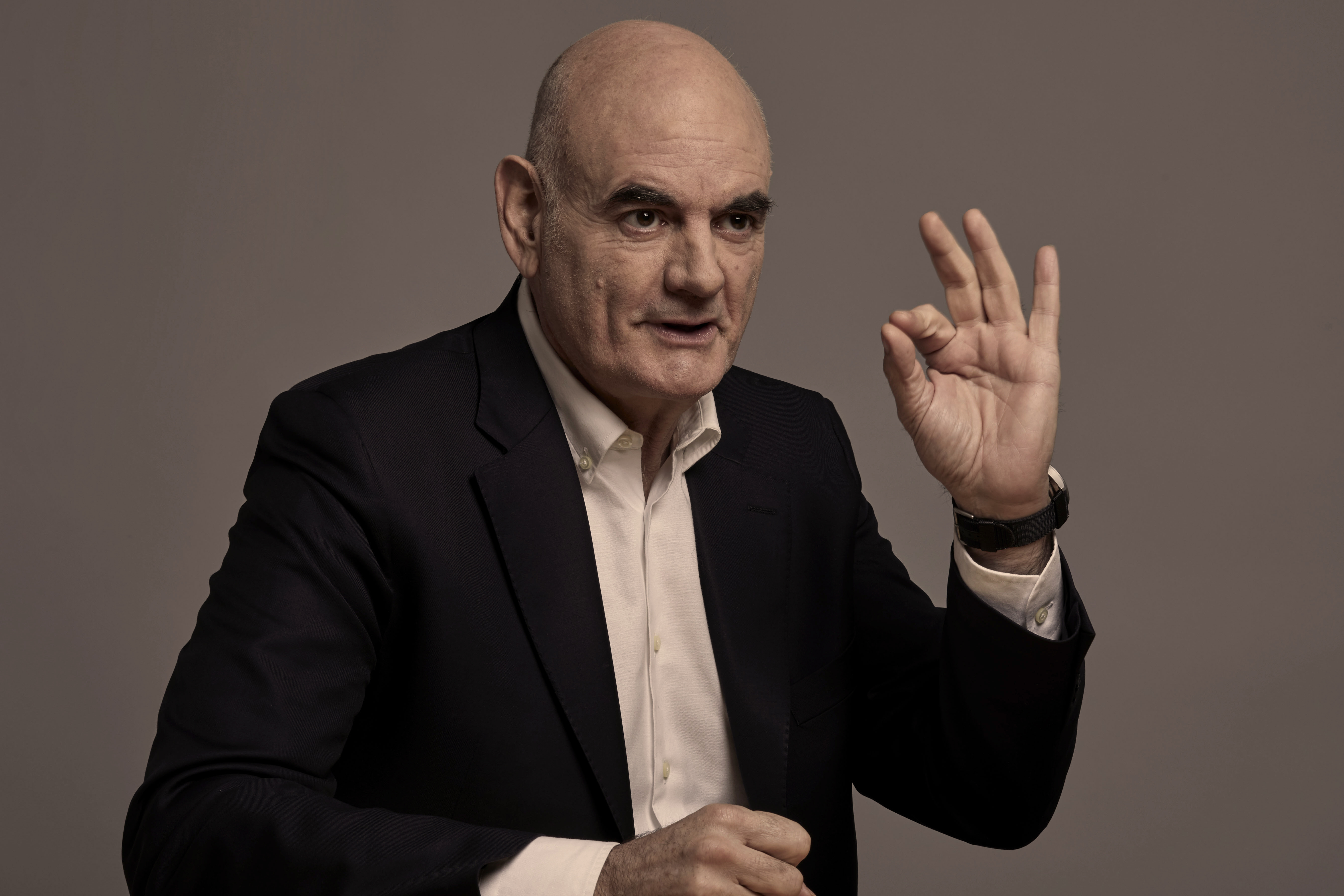 Ramon Masià, photoshoot 2018